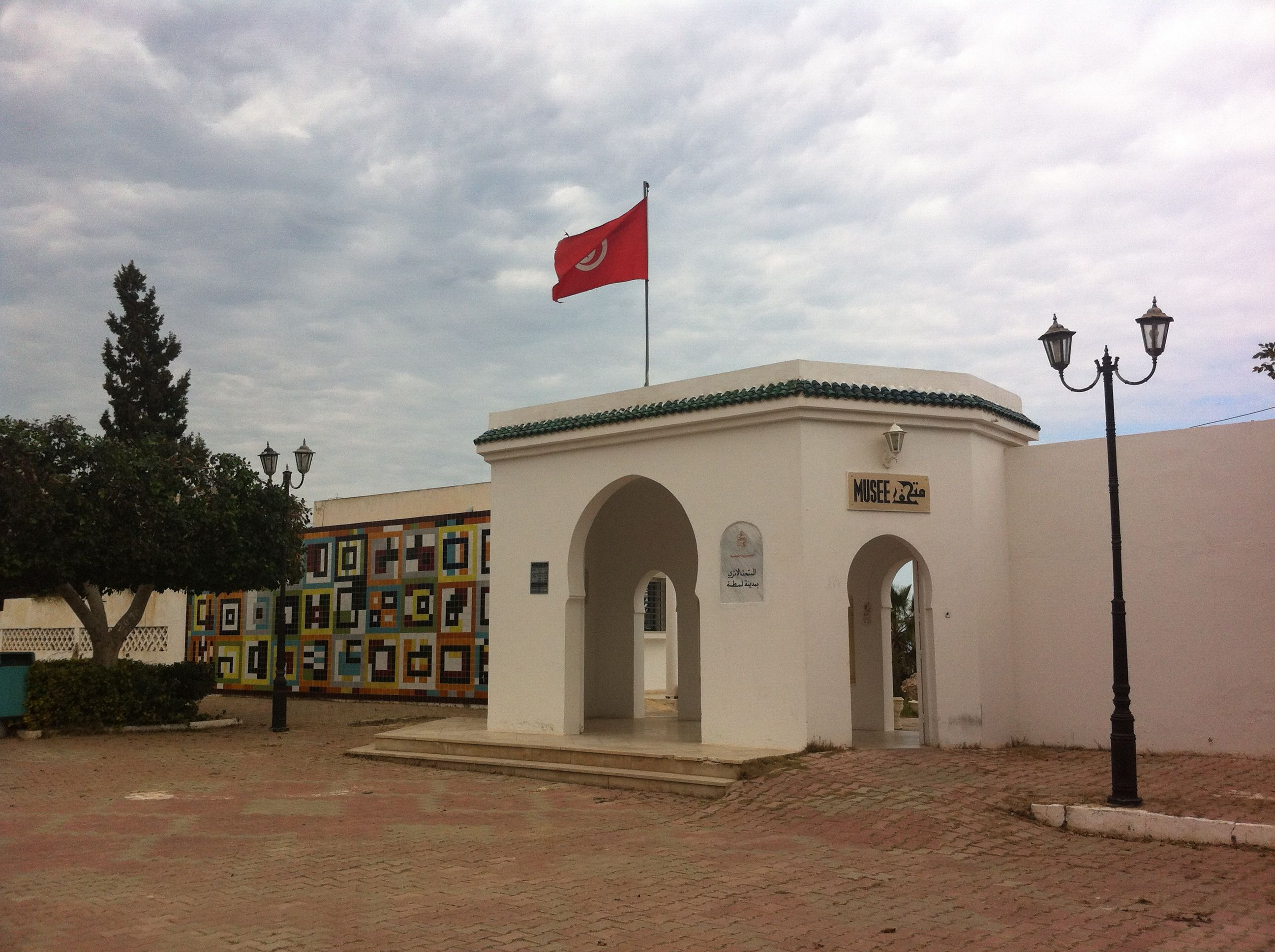 Porche d'entrée du musée archéologique de Lamta, Tunisie.